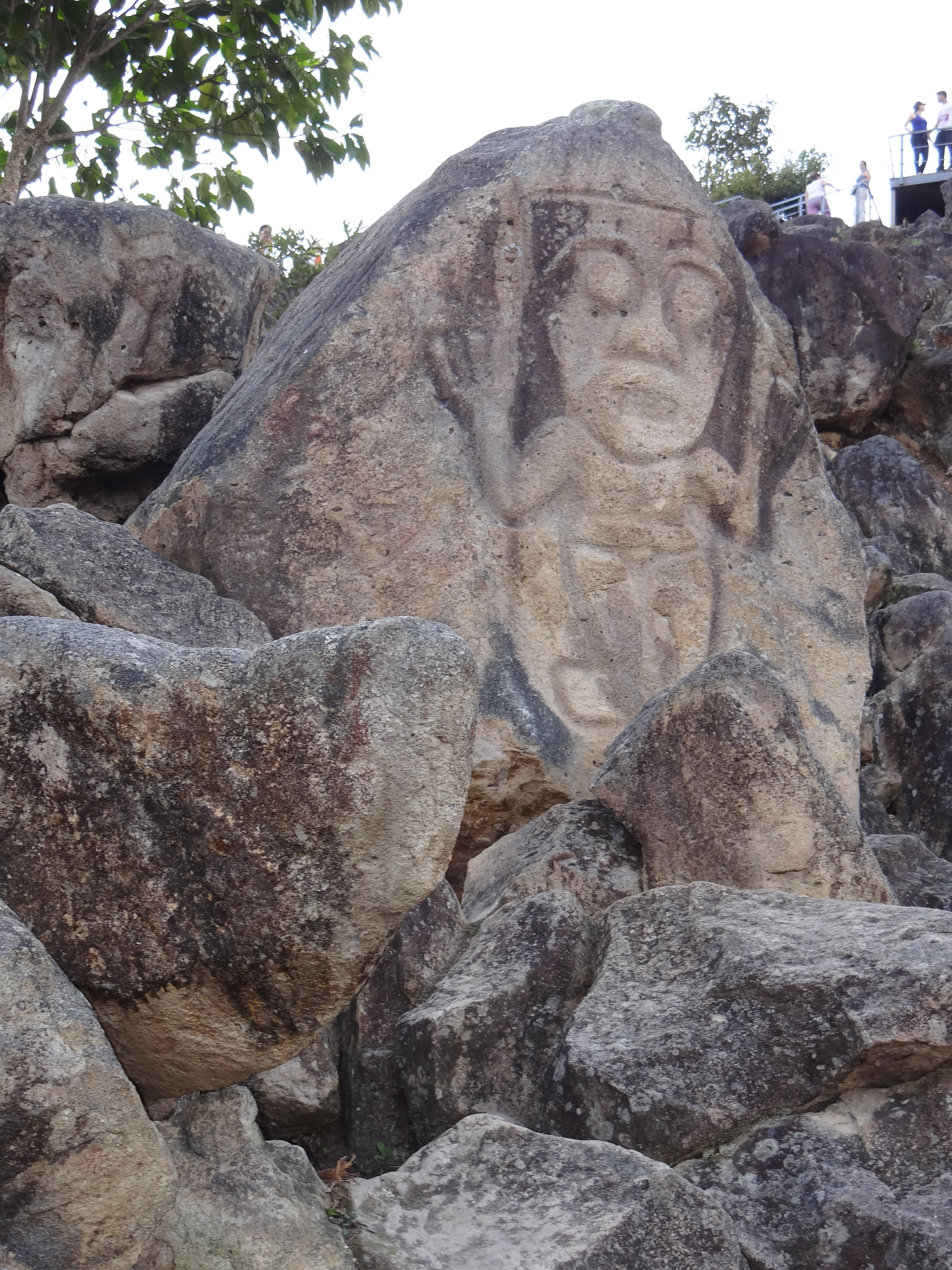 Piedra tallada, San Agustín